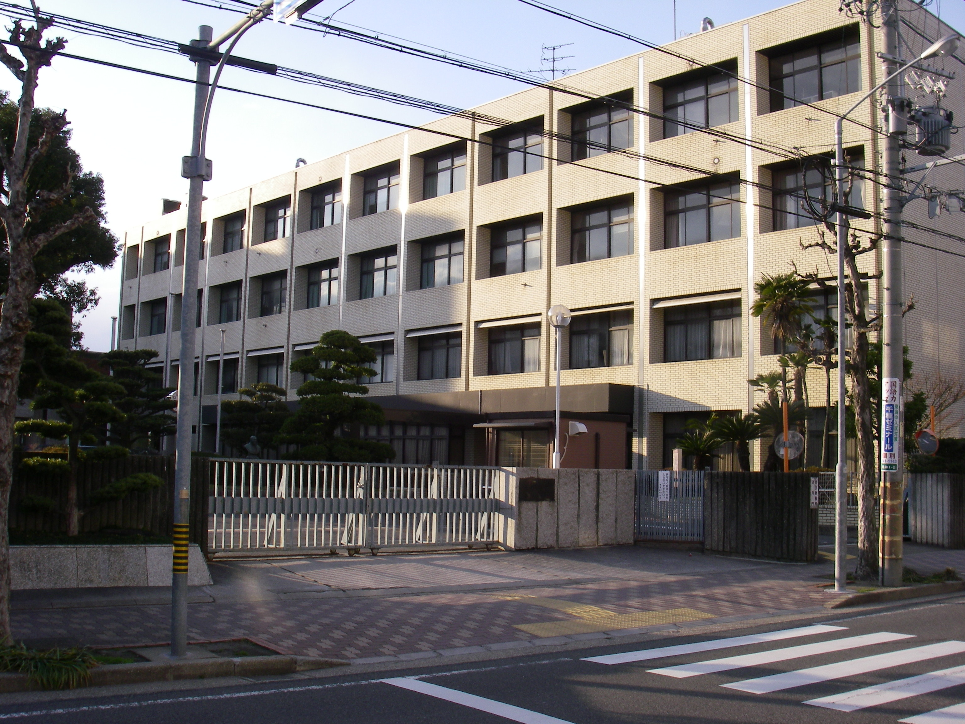 私立東海高等学校・東海中学校正門